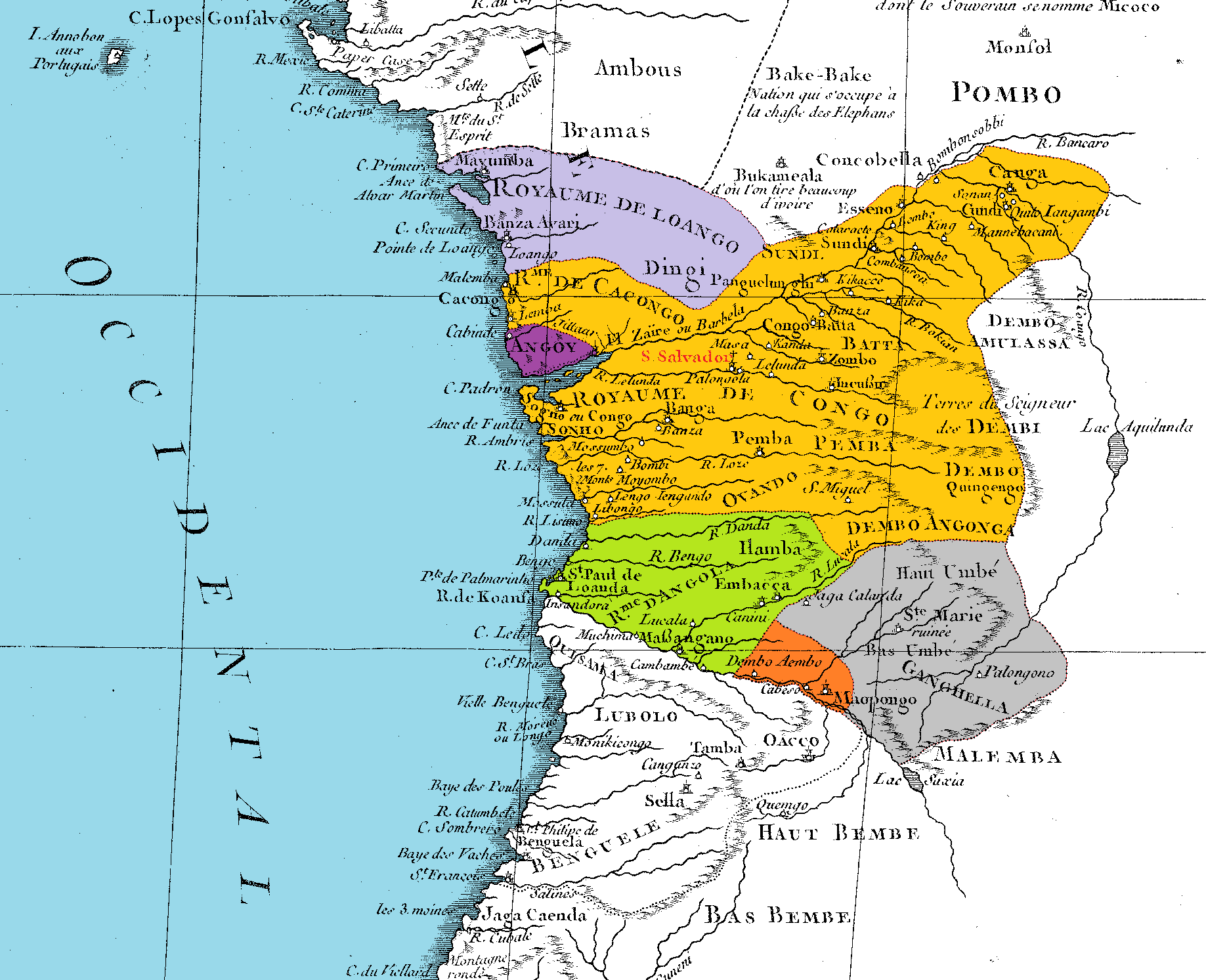 Fragmento retocado y coloreado de File:1770 Bonne Map of West Africa (Guinea, the Bight of Benin, Congo) - Geographicus - WestAfrica-bonne-1770.jpg